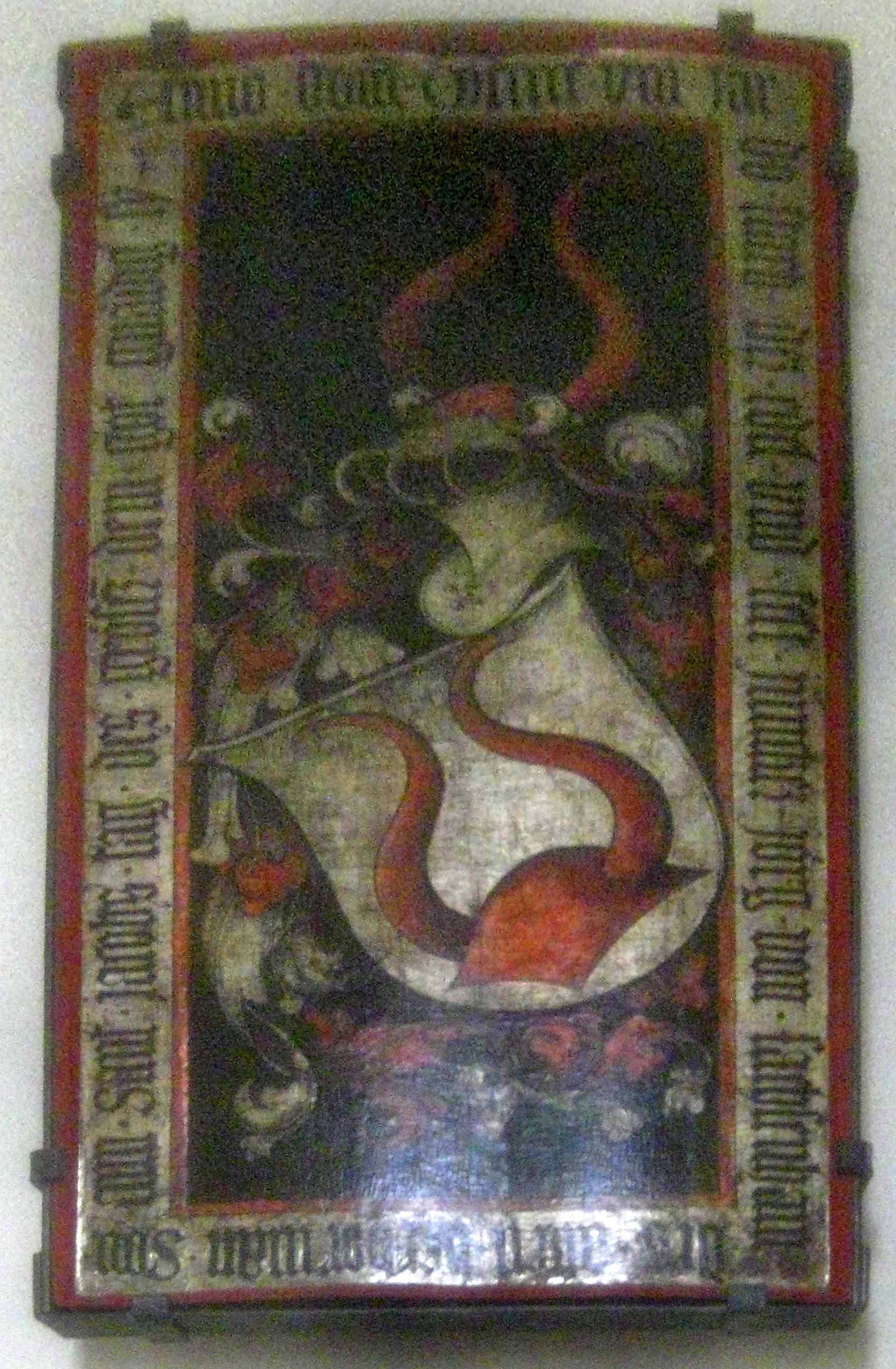 Totenschild des Jörg von Sachsenheim, 1508, Großsachsenheim, Kirche St. Fabian und St. Sebastian.